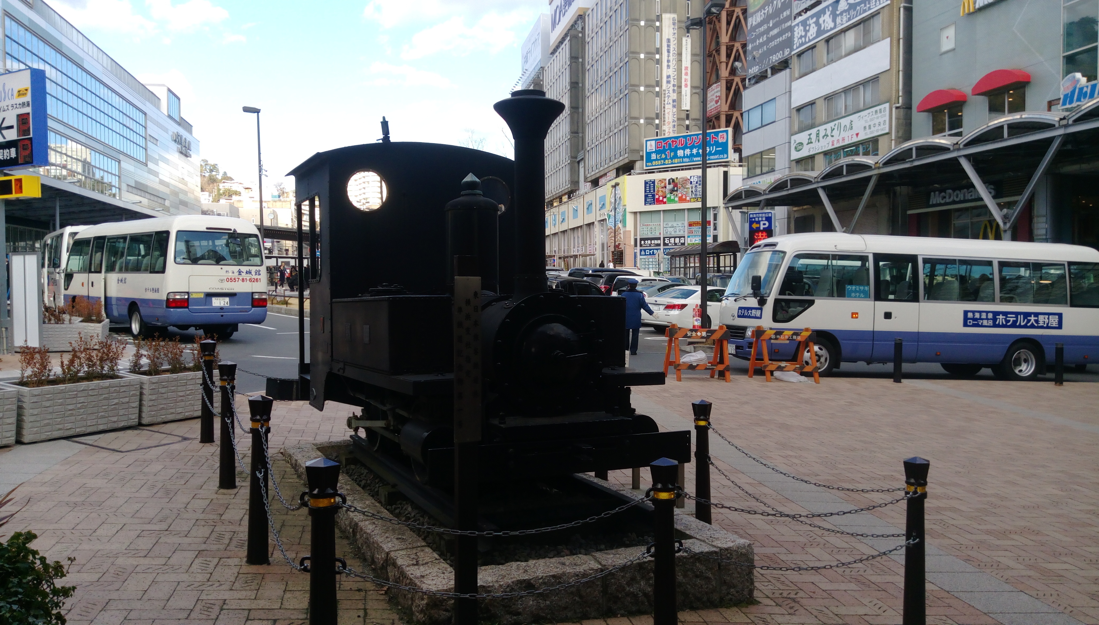 熱海車站前紀念蒸汽機車。